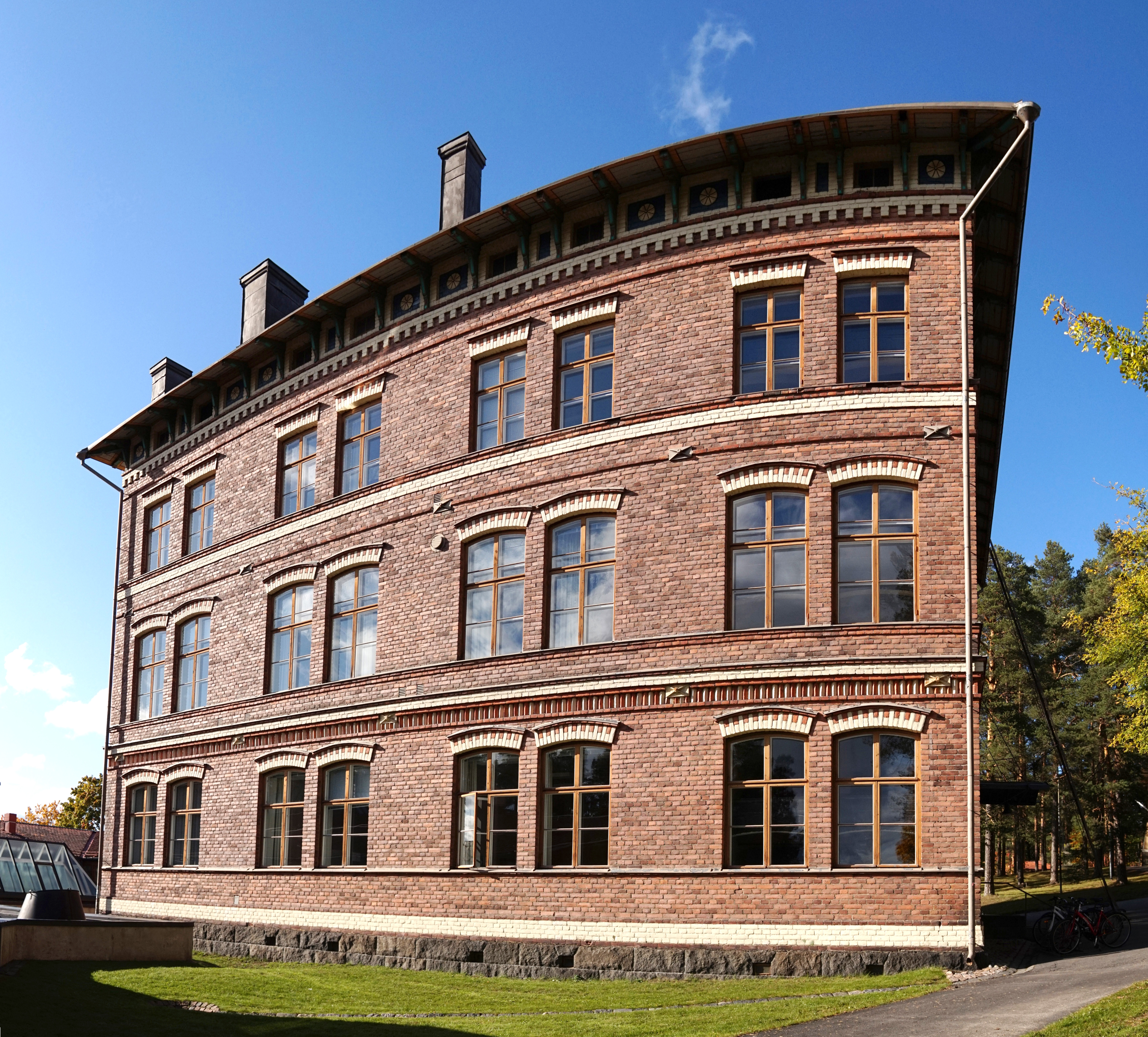 Fennicum, Jyväskylä.